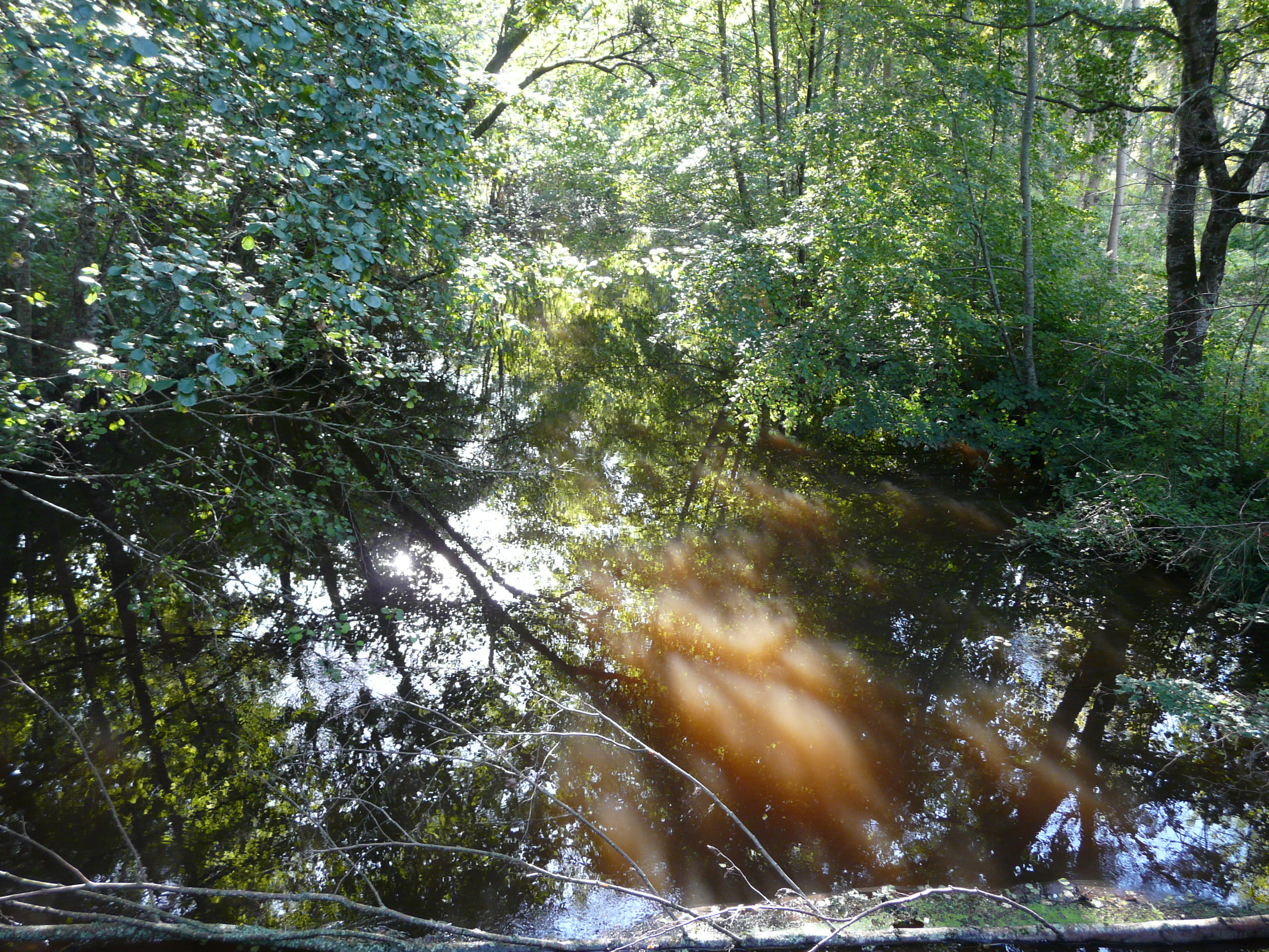 Le Bandiat près de Villejalet, entre Saint-Martin-le-Pin (à gauche) et Lussas-et-Nontronneau (à droite), Dordogne, France. Vue prise en direction de l'amont.